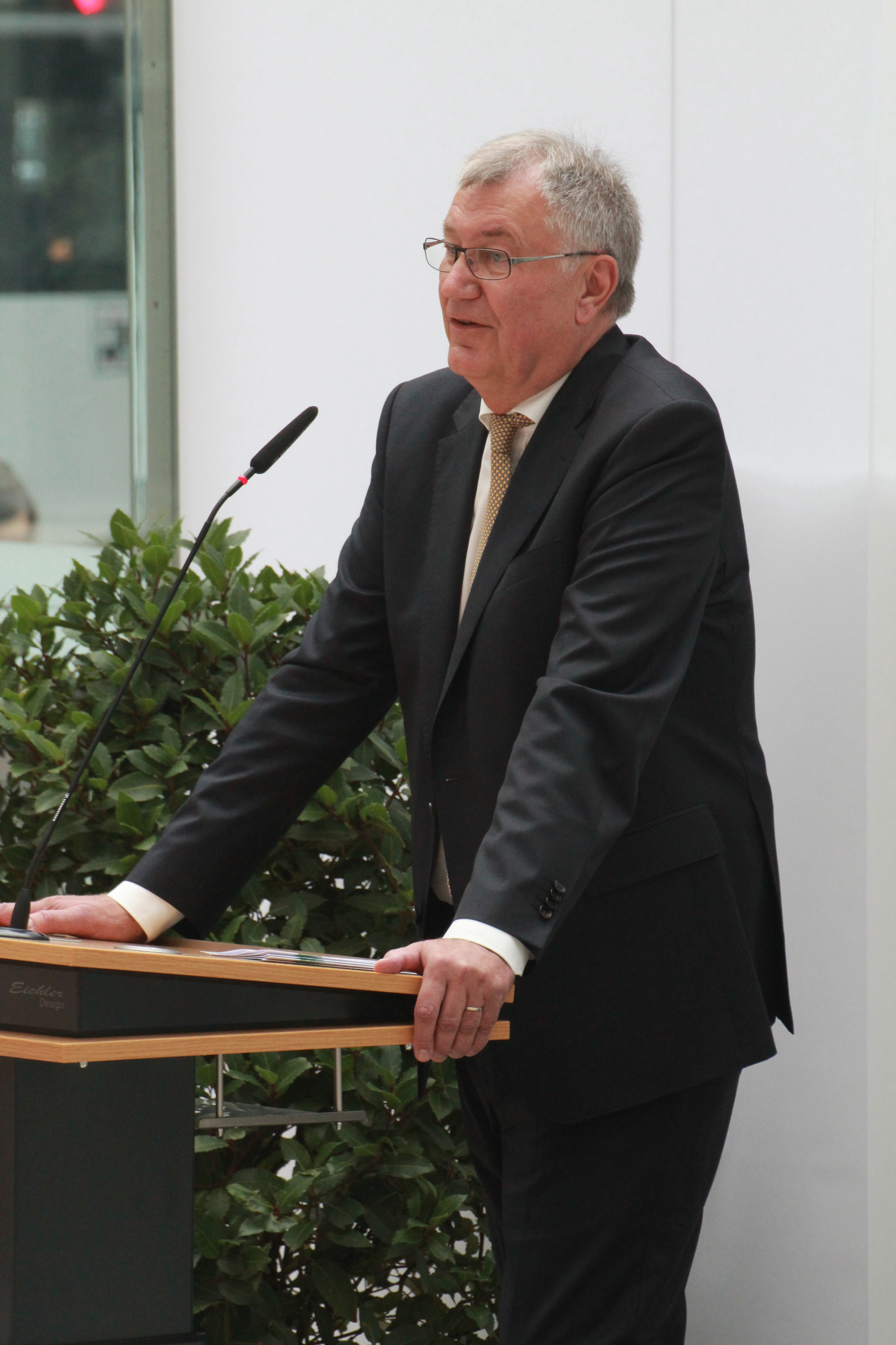 Reinhard Klenke, Jurist und CDU-Politiker, war seit 2011 Regierungspräsident des Regierungsbezirks Münster. Am 31. August 2017 wurde er in den Ruhestand verabschiedet, im Amt folgte ihm Dorothee Feller. Das Bild zeigt ihn während seiner Rede auf seiner Verabschiedungsfeier.